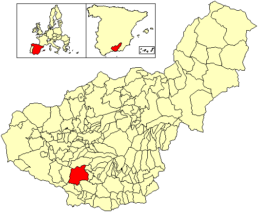 Situación del término municipal de Albuñuelas respecto a la provincia de Granada, en España.